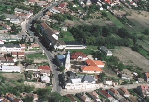 Nagyhalász, Hungary, aerialphotography